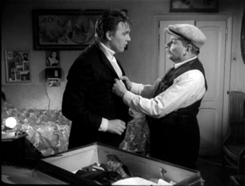 Screenshot del film I vitelloni (1953)